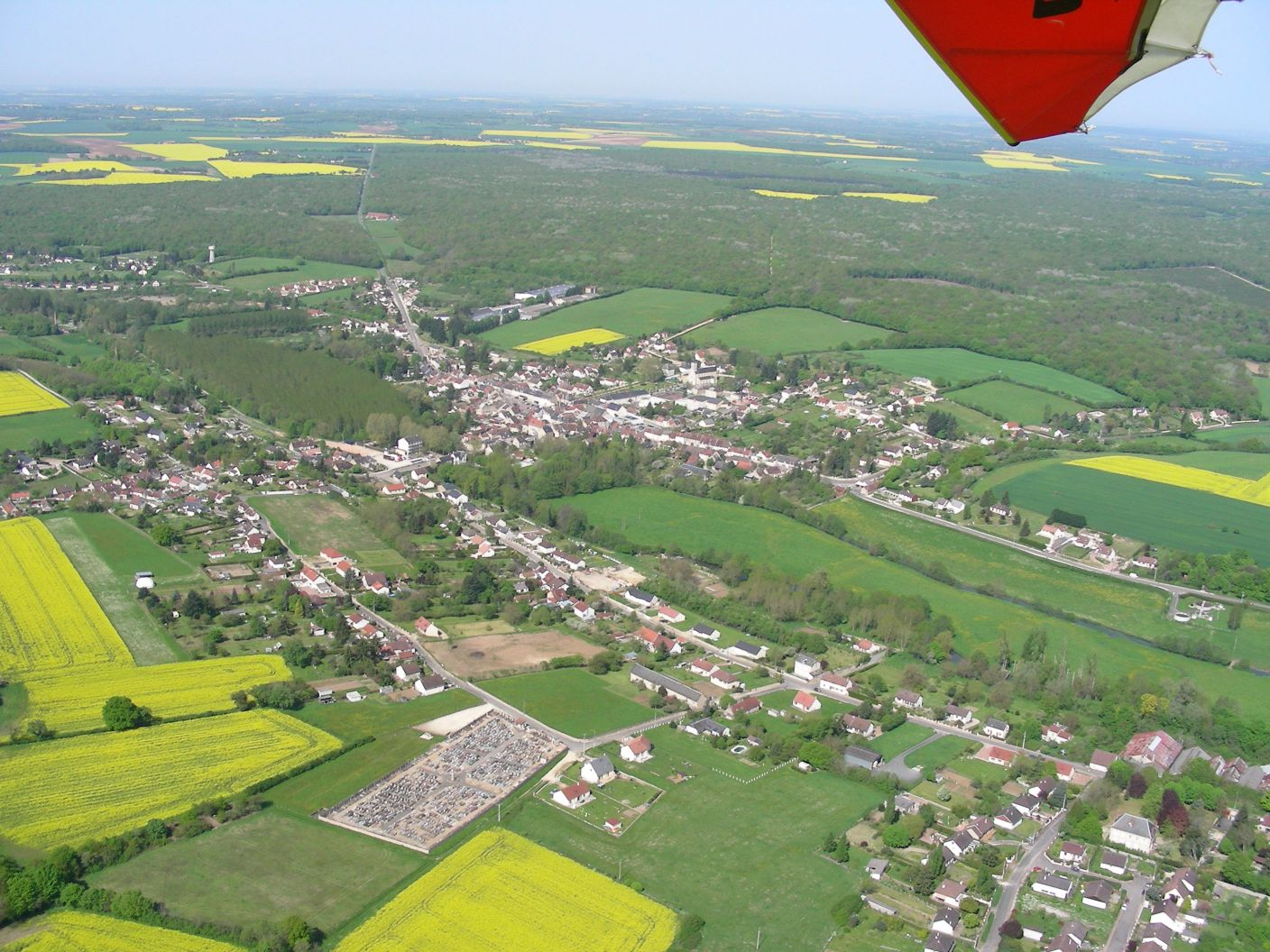 Jouet sur l'Aubois